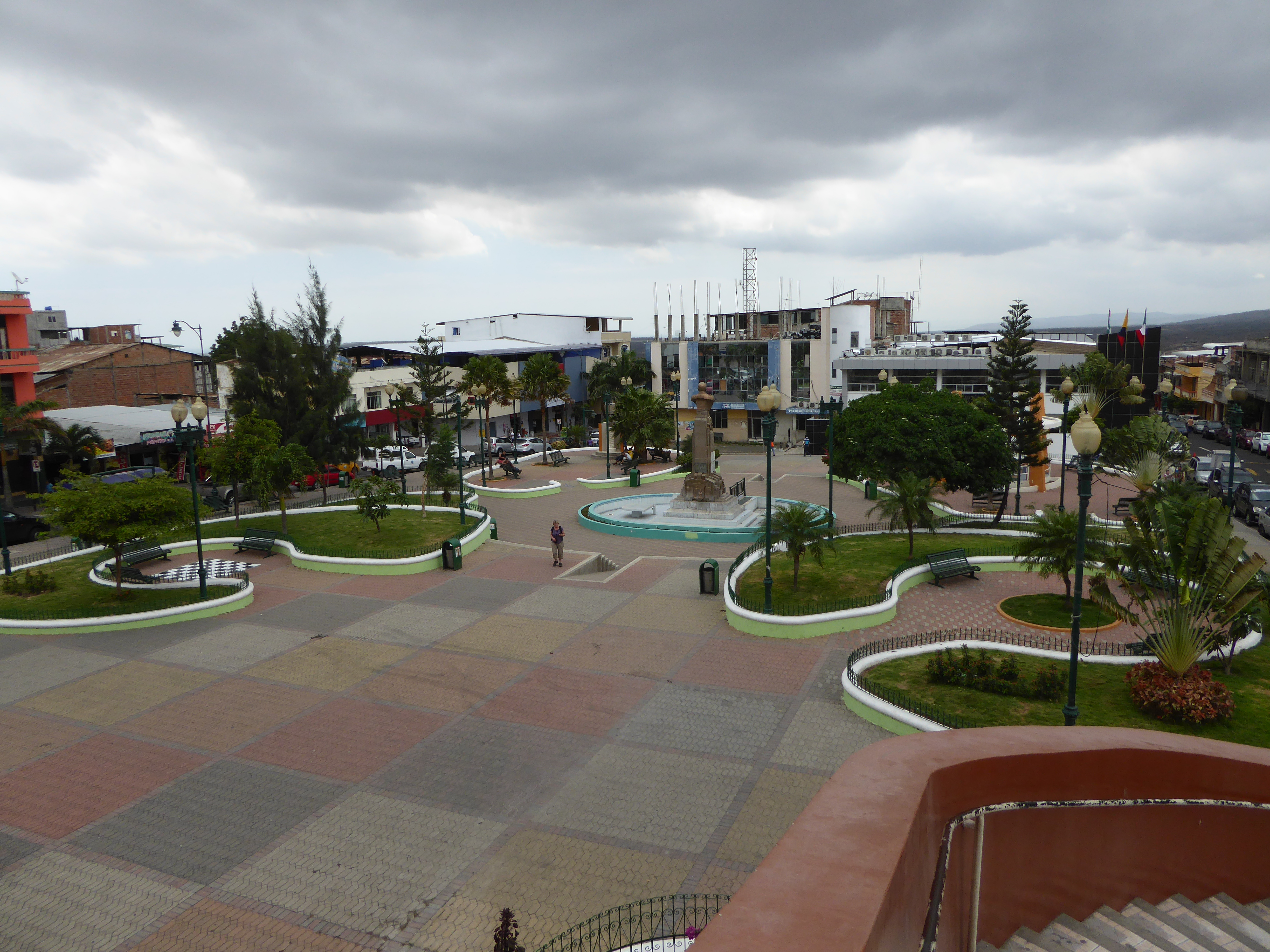 Zentrale Plaza in Montecristi